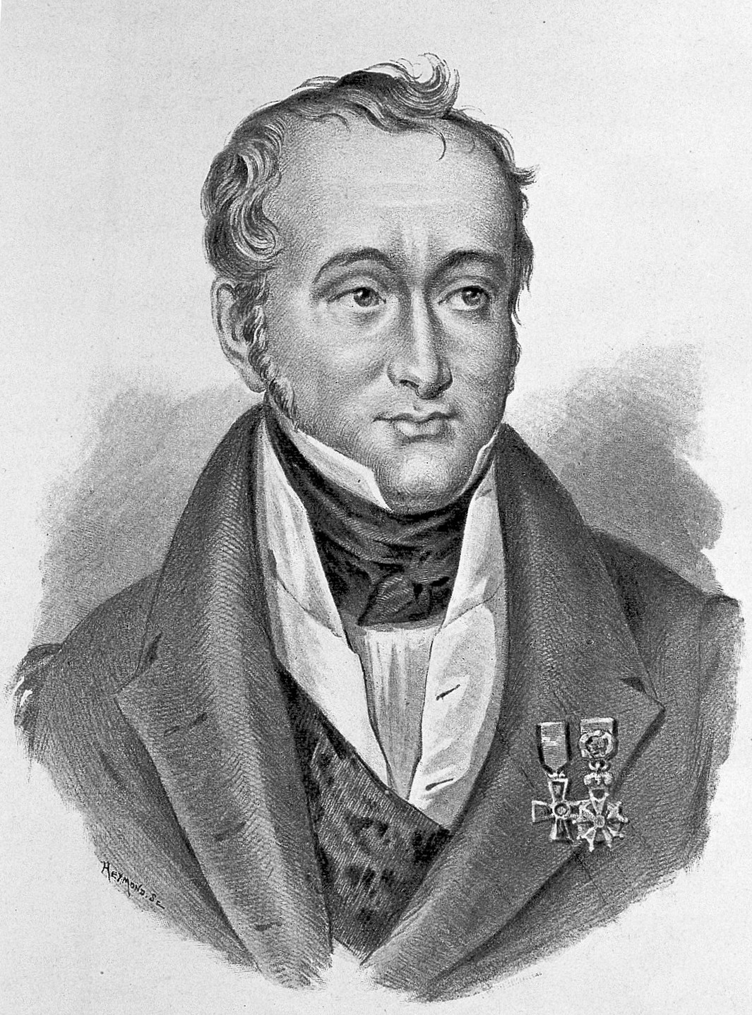 Guillaume Dupuytren